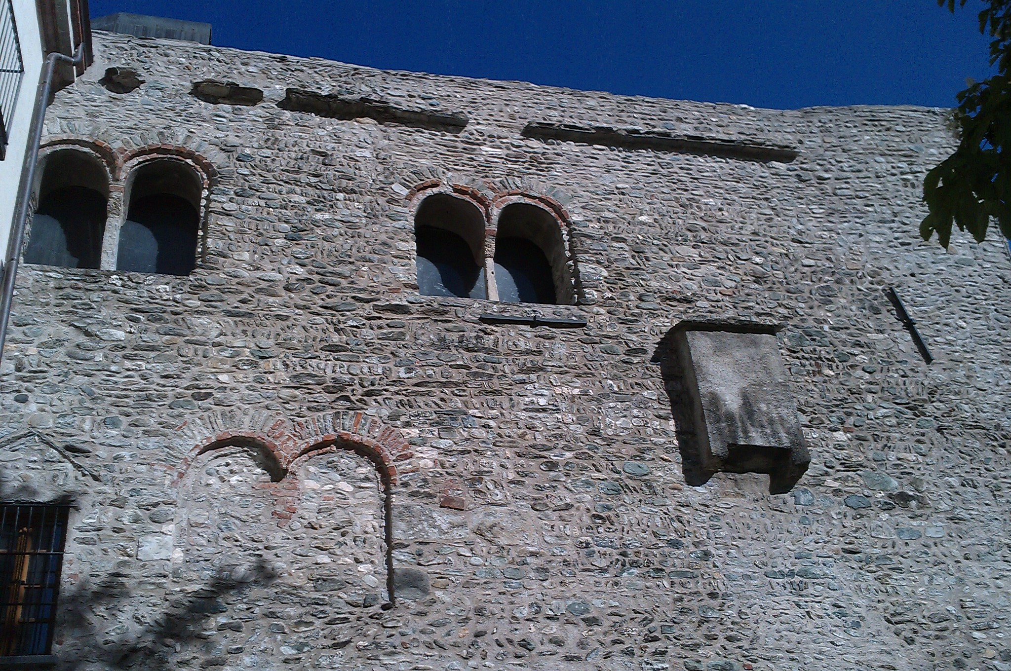 Susa